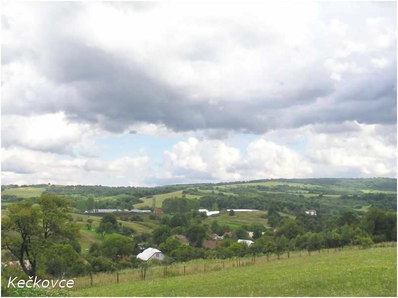 Celkový pohľad